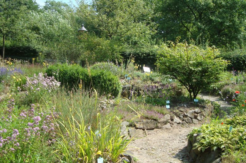 Ein Teil des Museumsgartens des Museums am Schölerberg Osnabrück.